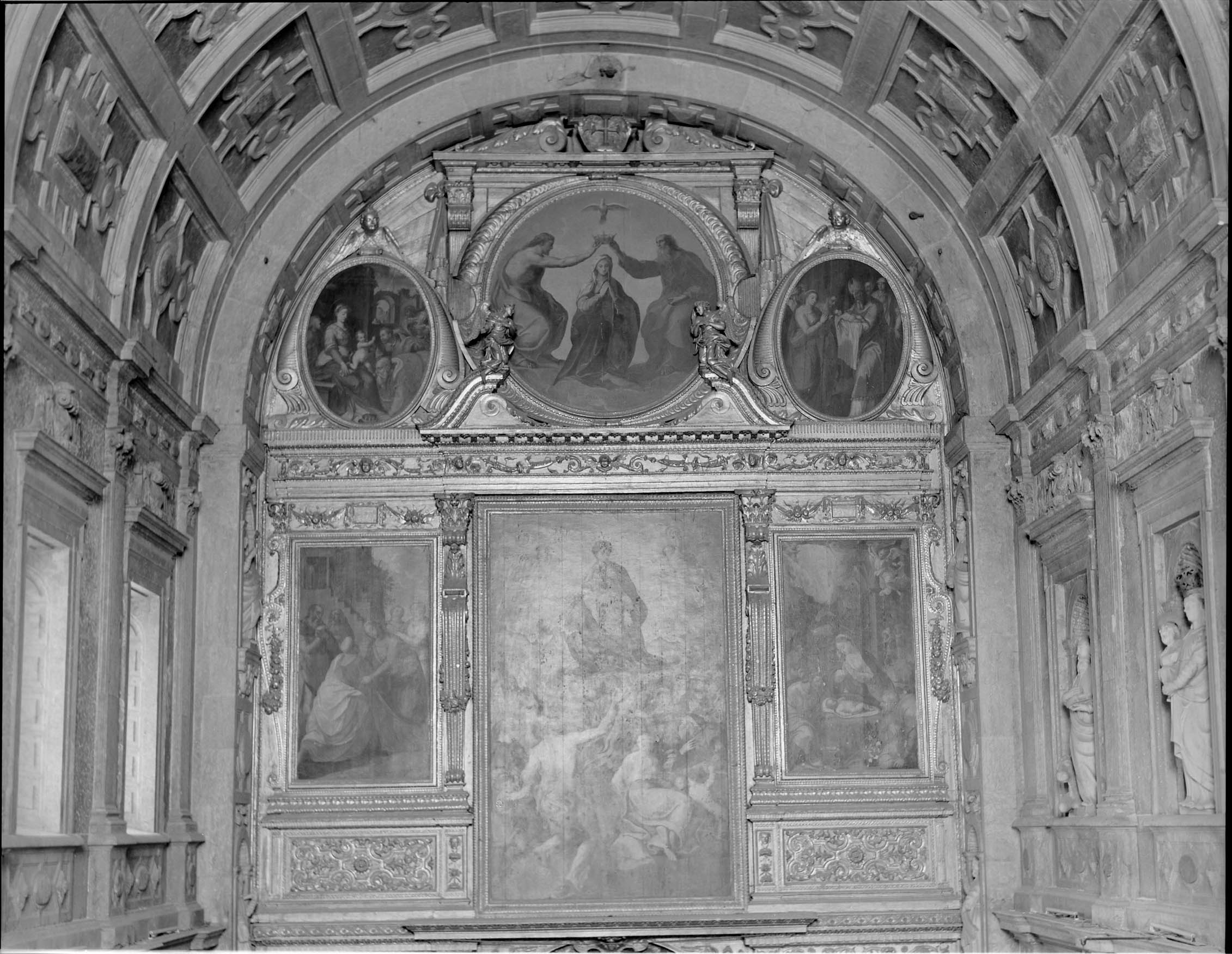 Retábulo da Capela-mor. Fotógrafo: Robert Chester Smith (1912-1975). Data de produção da fotografia original: 1962-1964. [CFT008.0511n.ic]